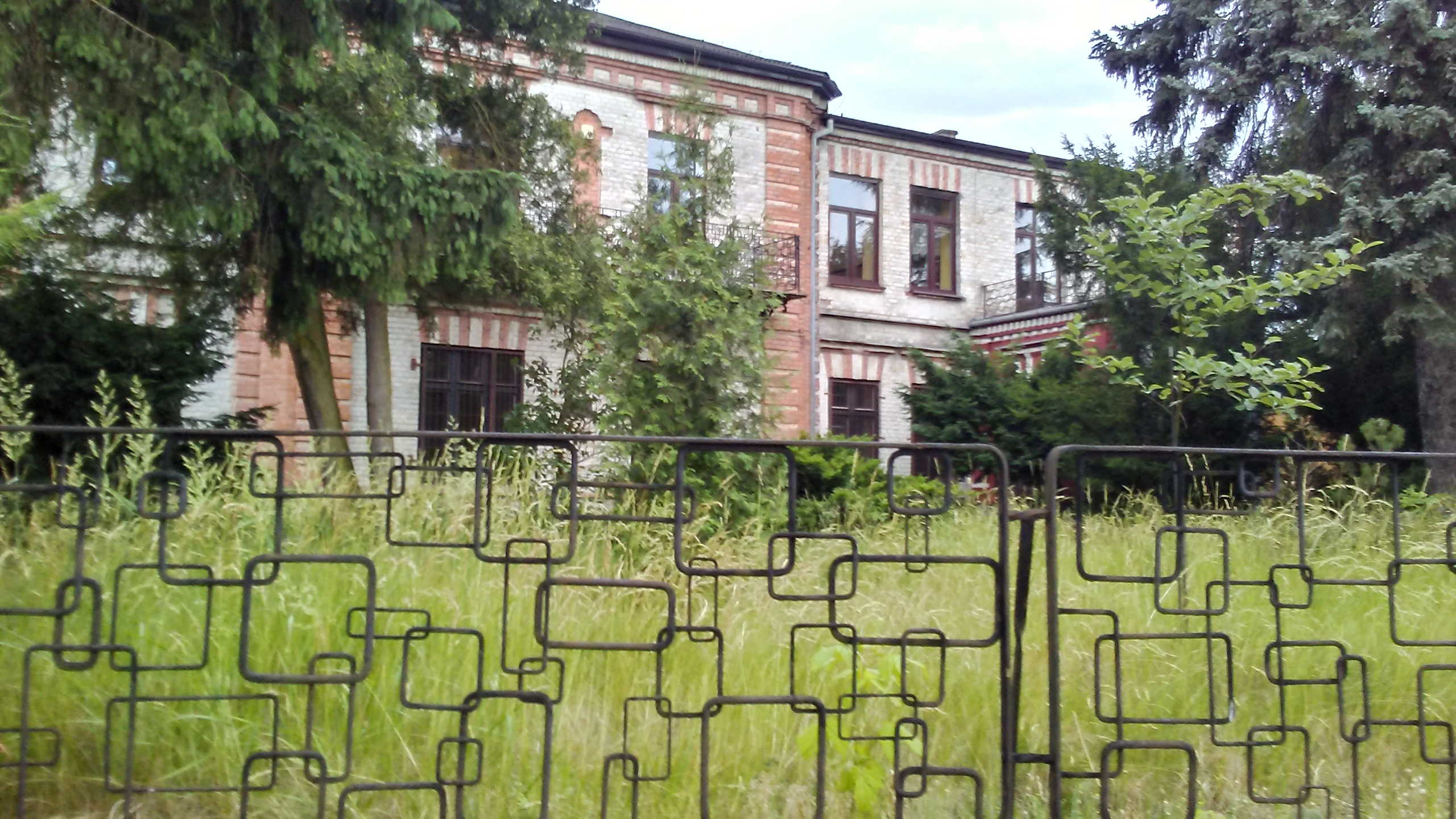 Willa znanego tomaszowskiego notariusza Jana Różyckiego. Przez wiele lat po wojnie Sanepid